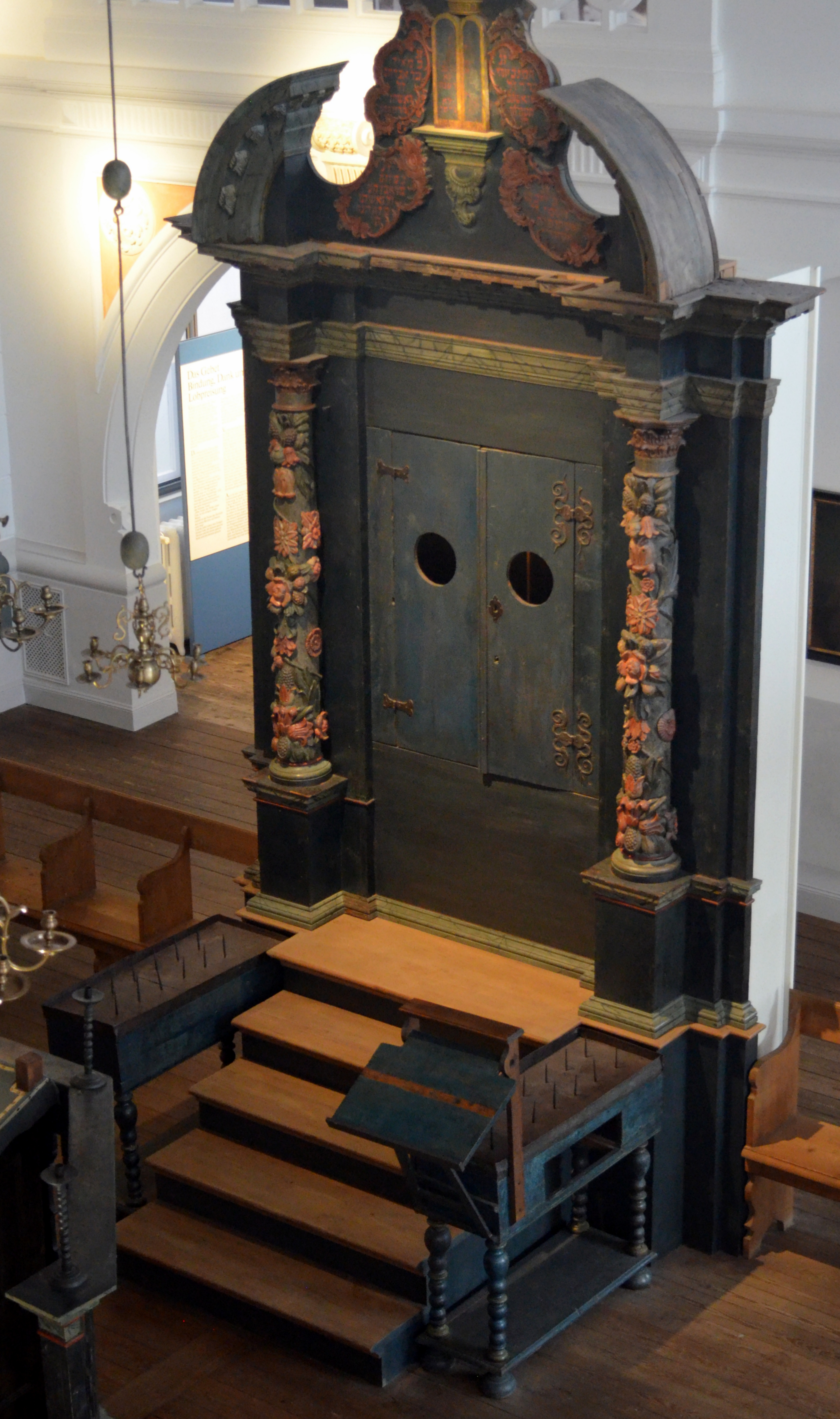 Hornburger Synagoge: Barocker Toraschrein im Jüdischen Museum Braunschweig, Zweigstelle des Braunschweigischen Landesmuseums, Hinter Aegidien.